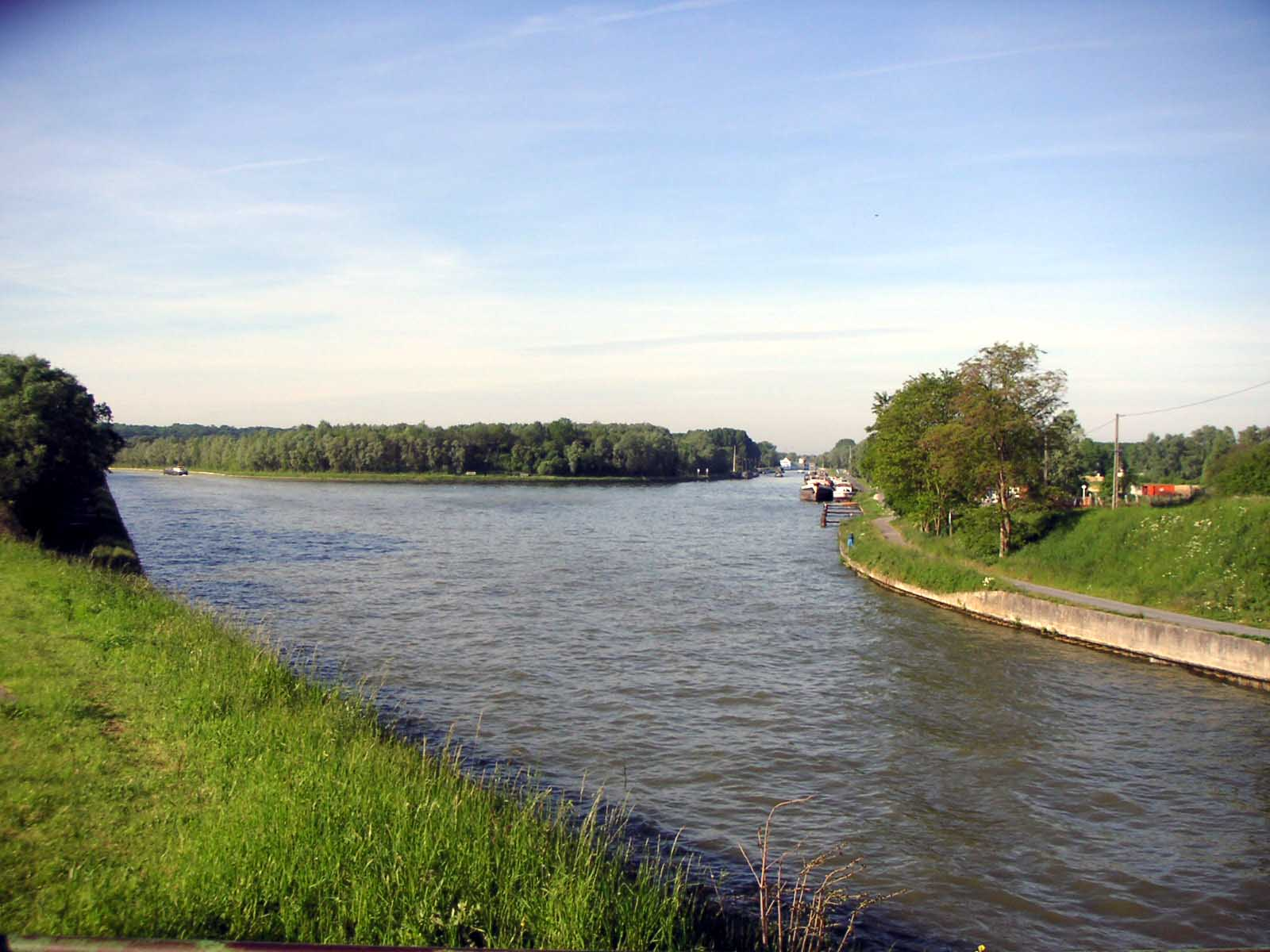 Carrefour entre le canal du nord (à droite) et le canal de la Sensée (à gauche). Port d'Arleux (Nord) sur le canal du Nord, avec l'écluse n°1 de Palluel (Pas-de-Calais) (Padawane)